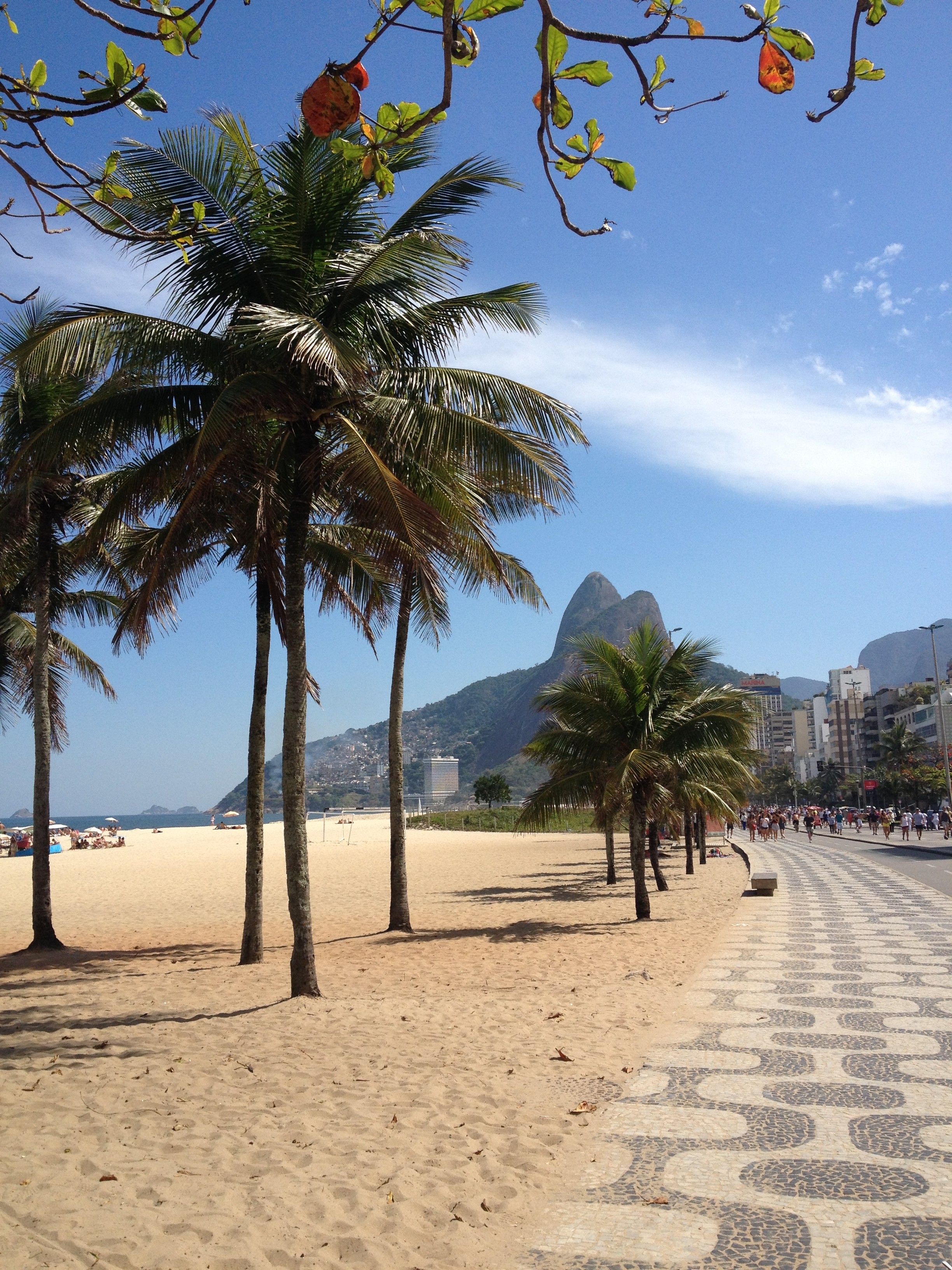 Praia de Ipanema e Morro Dois Irmãos.